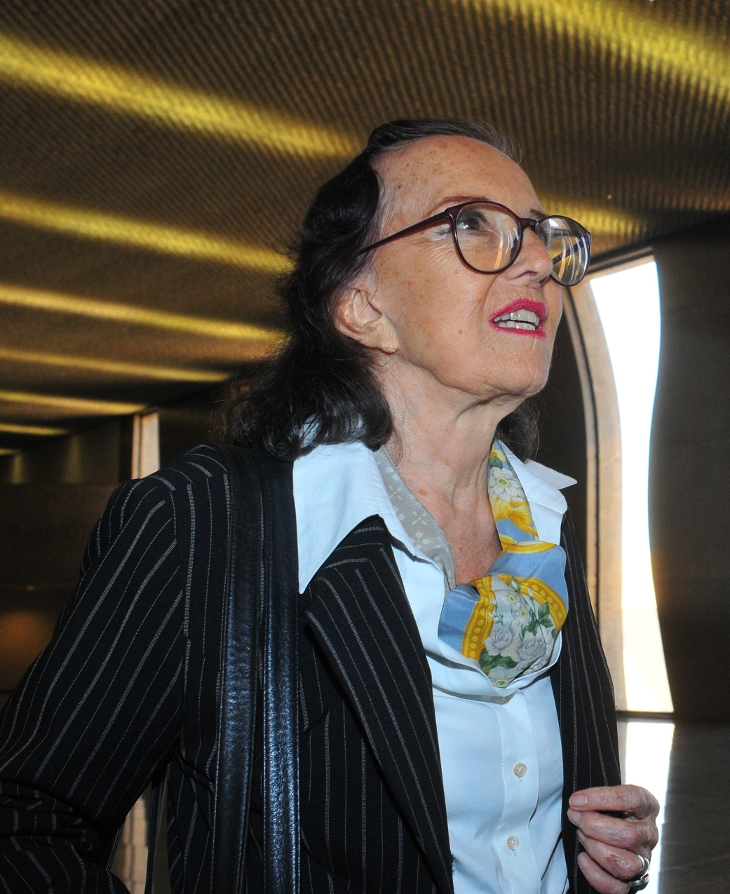 Marianne Peretti em 2011